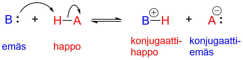 Pieni korjaus kuvaan